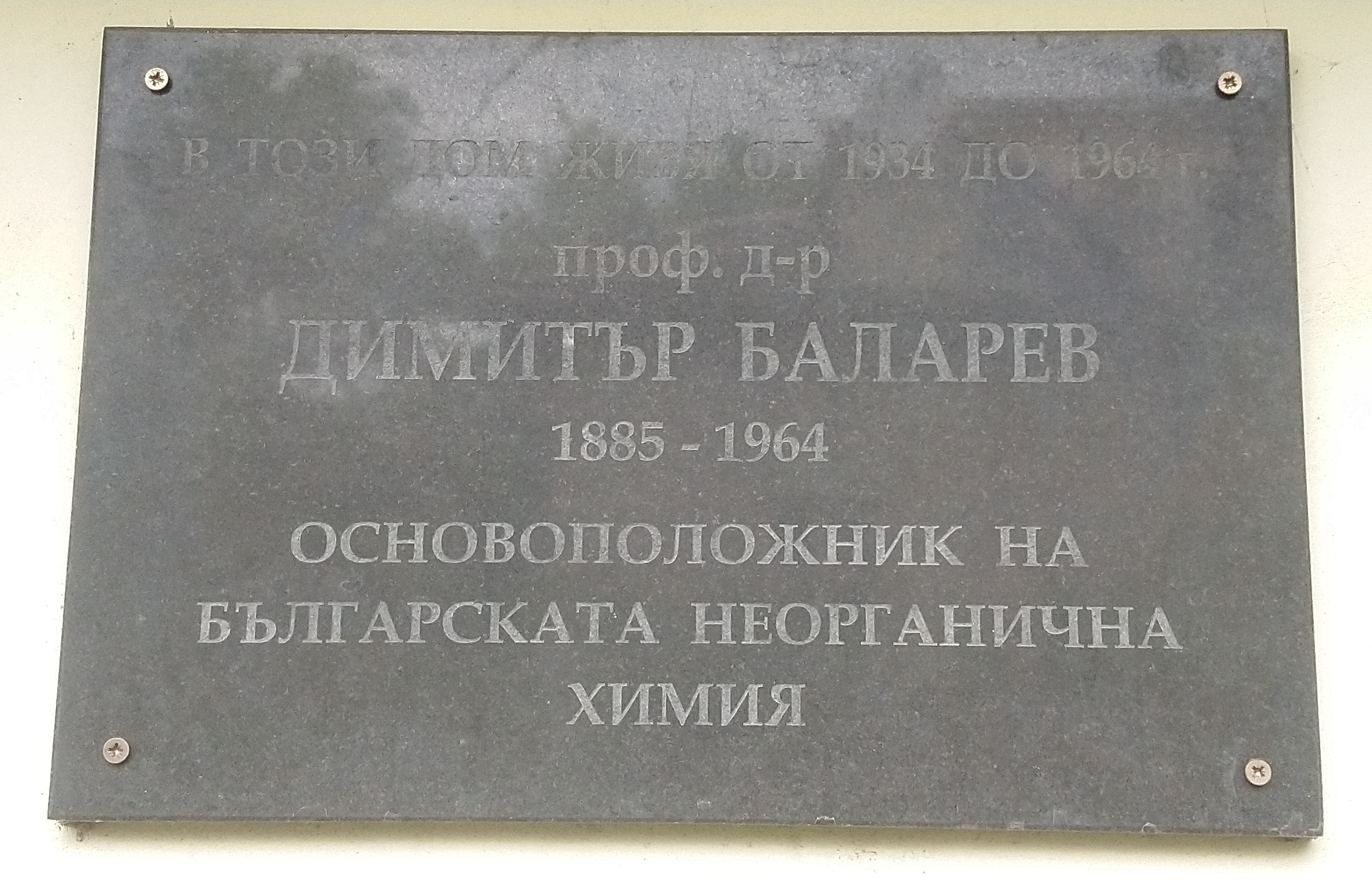 Паметна плоча на химика проф. Димитър Баларев, ул. Добромир Хриз 20, София